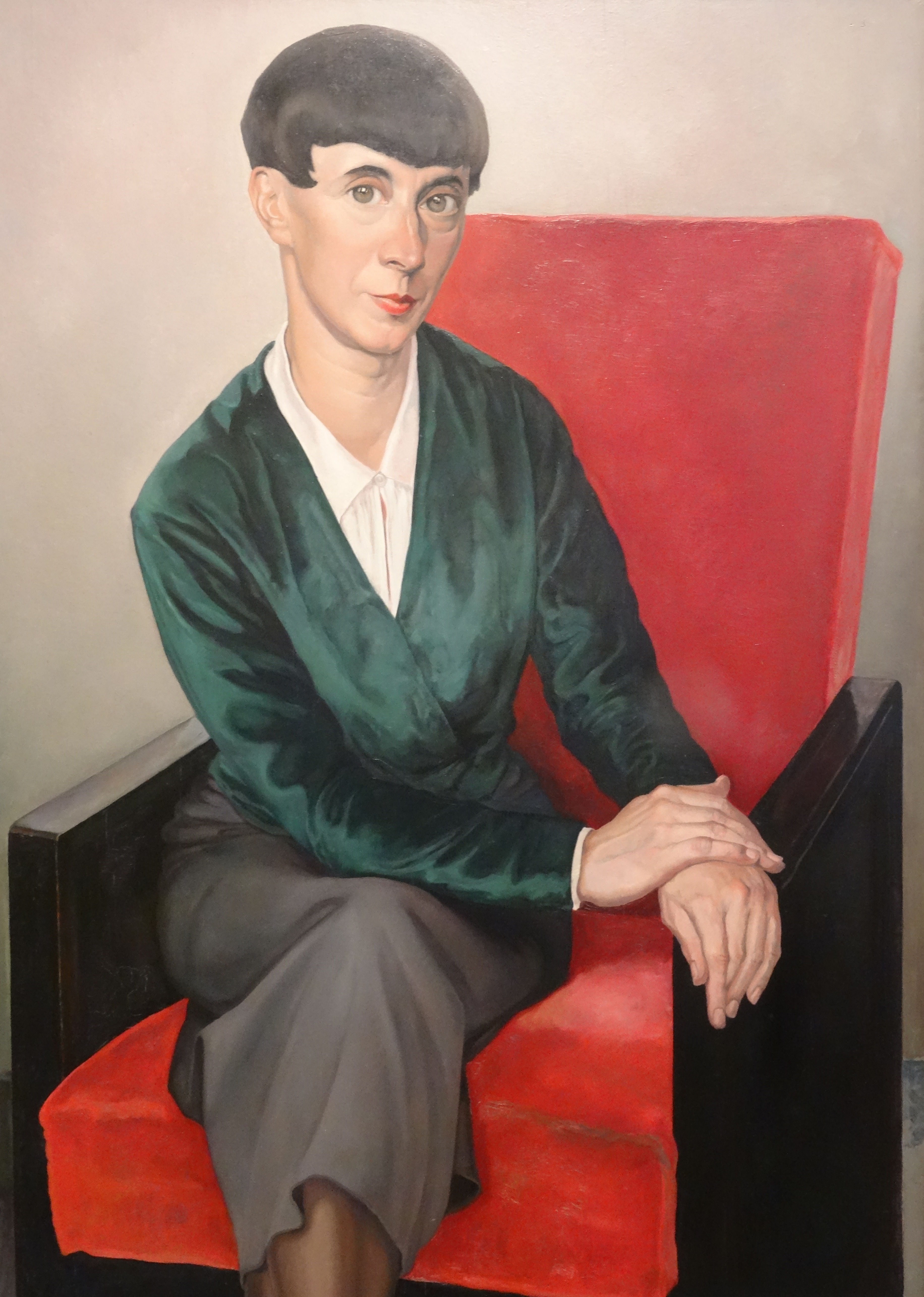 Portret van Hannah Höch (1933), door Chris Lebeau (1878-1945). Höch zit op een stoel die is ontworpen door Cornelis van der Sluys